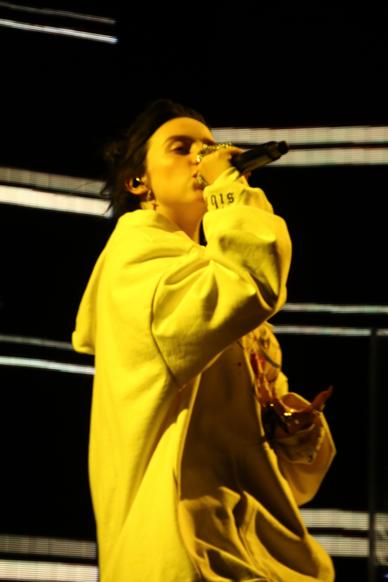 Billie Eilish ::: Red Rocks::: 06.05.19